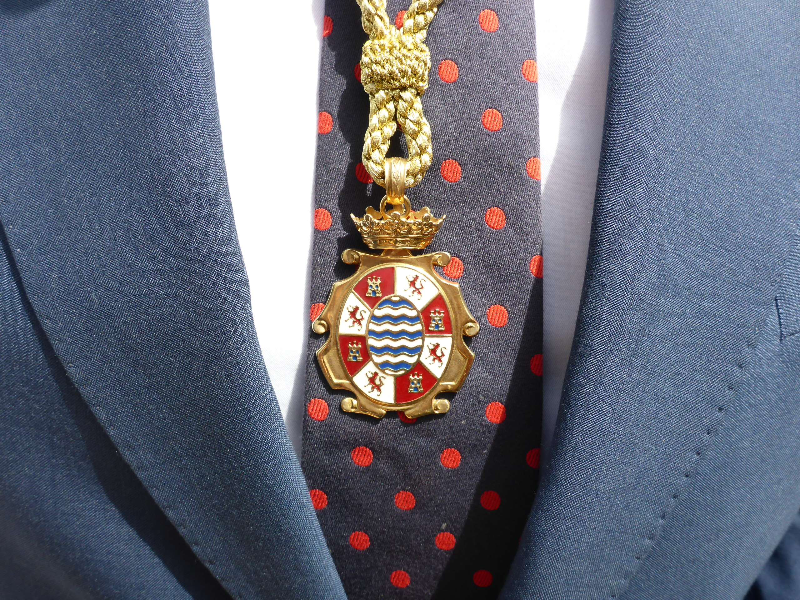 Medalla de Concejal de Jerez de la Frontera (España)